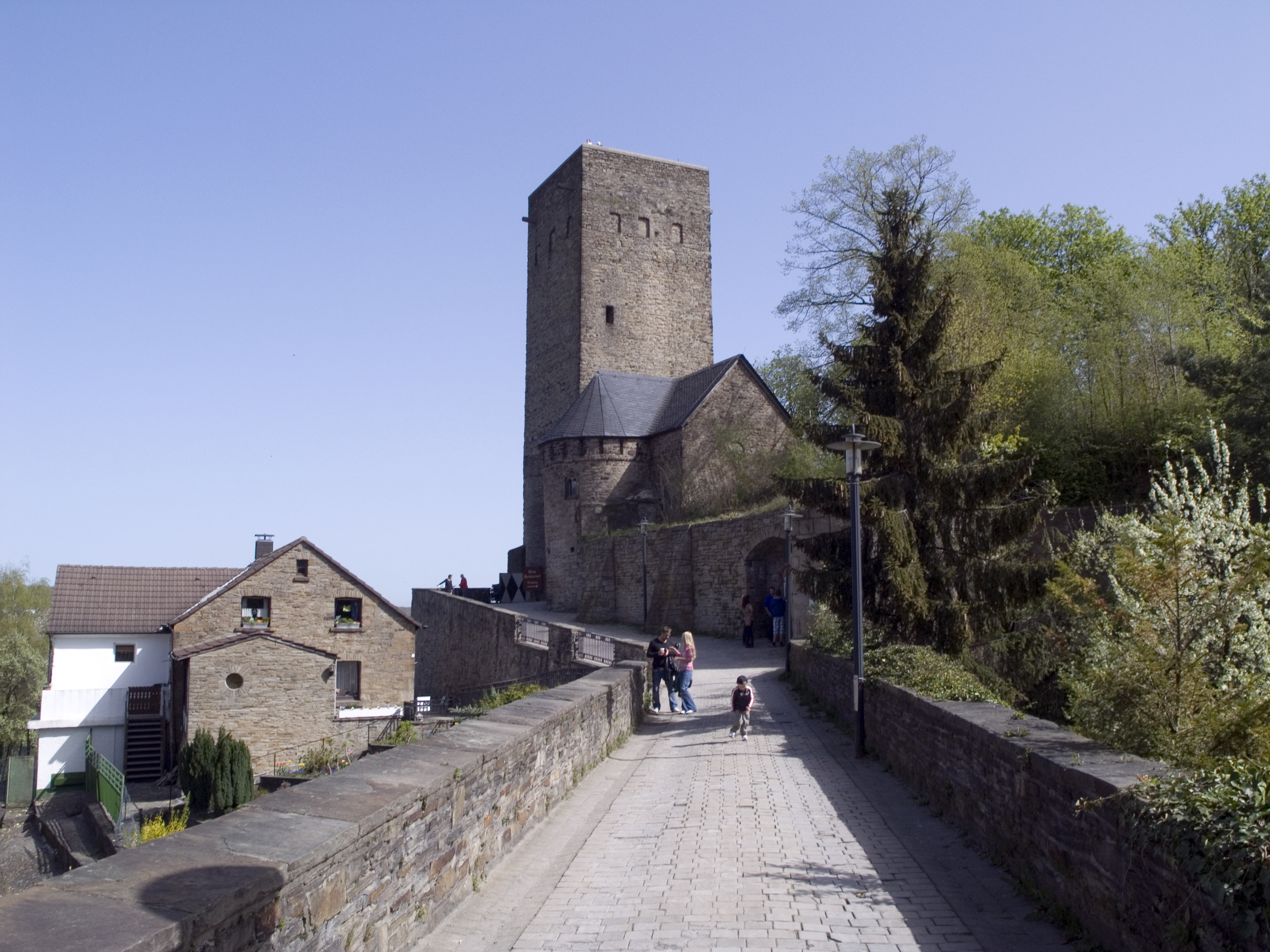 Северный Рейн - Вестфалия, Хаттинген. Замок Бланкенштайн